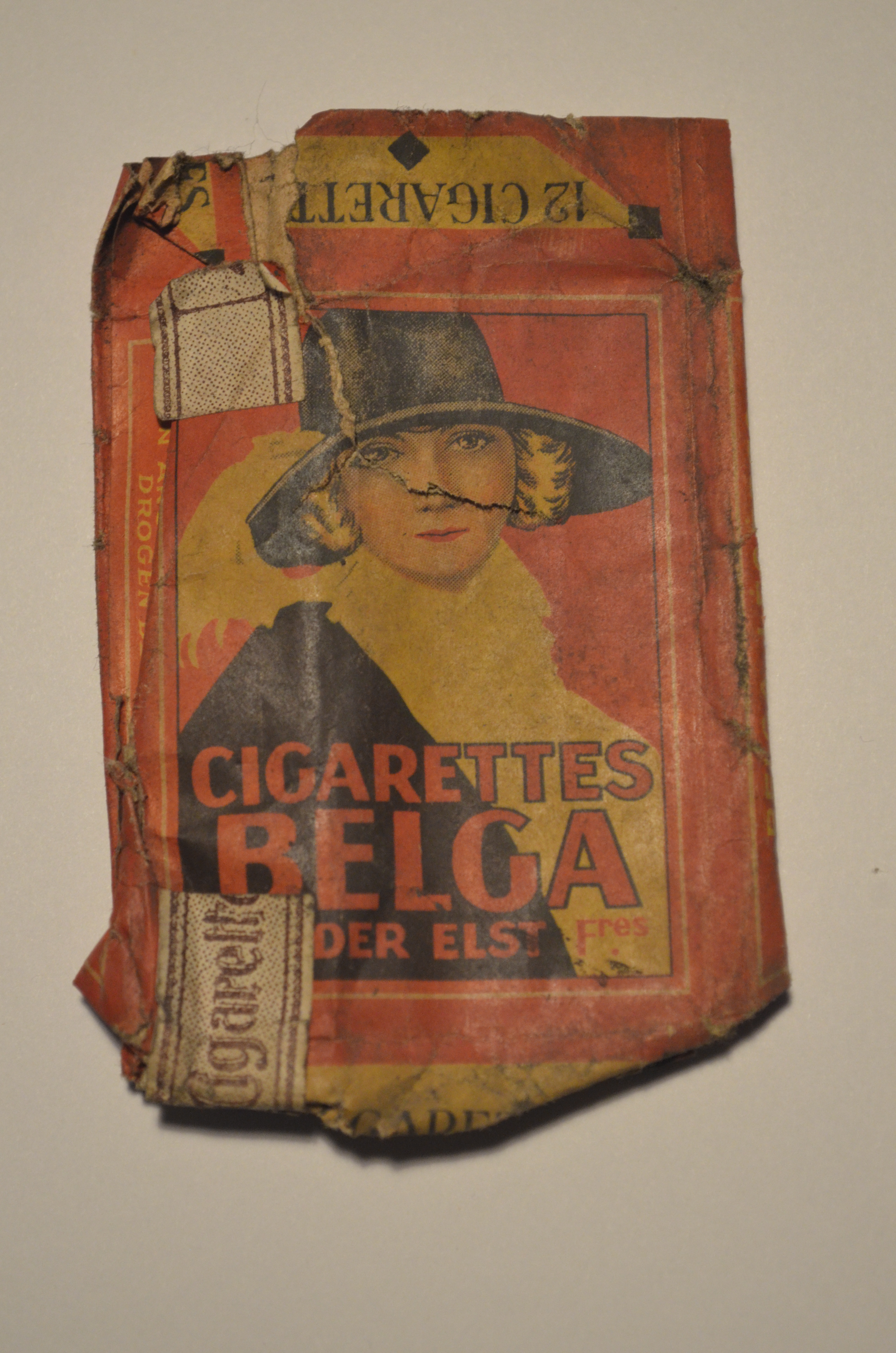 Cigarettes Belga - paquet de 12 cigarettes légères vendu au prix de 1,41 BEF - recto.